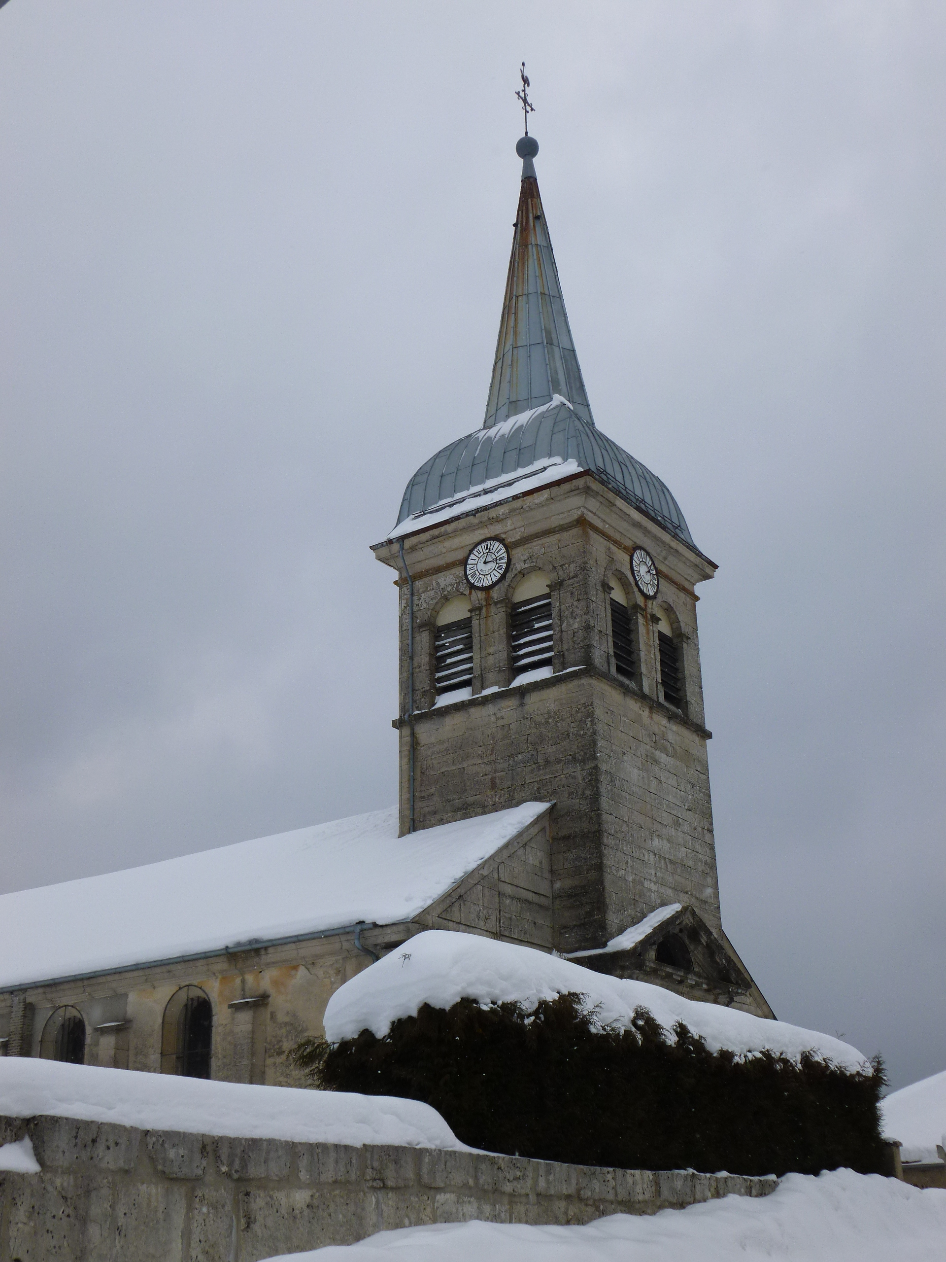 Clocher de l'église de Charix, dans l'Ain